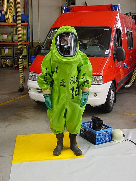 Selbst erstellt